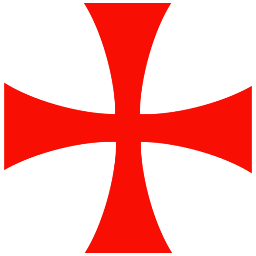 Tamplierlərin xaçı (nişanəsi)